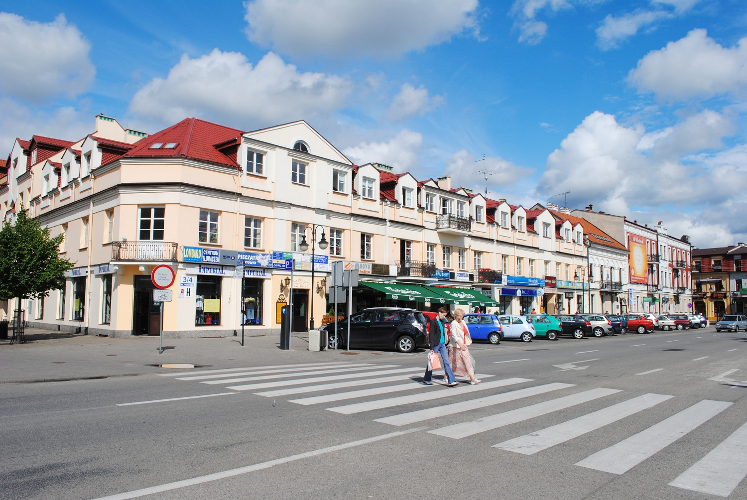 Północna pierzeja Placu Wolności we Włocławku